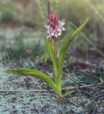 Dactylorhiza incarnata, Vleeskleurige orchis op de Hors (Texel) 2003 Eigen foto, vrijgegeven onder GNU/FDL